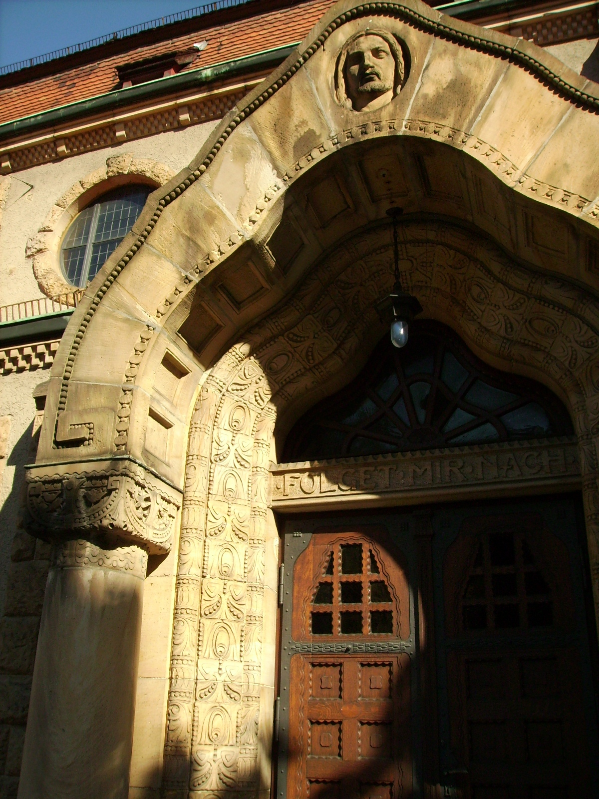 Markuskirche